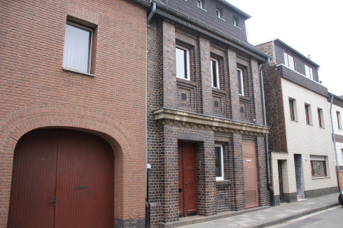 Gertrudisstr. 7 in Düren-Merken